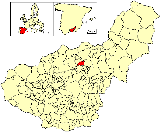 Situación del término municipal de Huélago respecto a la provincia de Granada, en España.